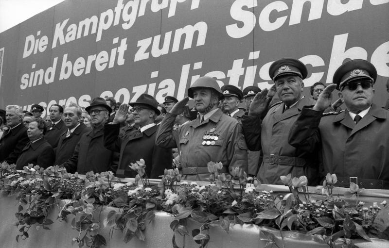 Berlin, 25 Jahre Kampfgruppen, Appell, Ehrentribüne ADN-ZB/Junge 30.9.78 Berlin: Zum 25jährigen Bestehen der Kampfgruppen der Arbeiterklasse fand am 30.9.78 in Berlin ein Kampfapell mit anschließendem Vorbeimarsch statt. Auf der Ehrentribüne v.l.n.r.: Konrad Naumann, Willi Stoph, Erich Honecker, Karl Stingl, Kommandierender des Kampfappells, Heinz Hoffmann und Erich Mielke. Abgebildete Personen: Mielke, Erich: Minister für Staatssicherheit, Armeegeneral, Politbüro des Zentralkomitees (ZK) der SED, DDR (GND 118977490) Naumann, Konrad: 1. Sekretär Bezirksleitung Berlin der SED, Staatsratsmitglied, DDR Stoph, Willi: Ministerpräsident, Staatsratsvorsitzender, Armeegeneral, SED, DDR Honecker, Erich: Staatsratsvorsitzender, Generalsekretär des ZK der SED, DDR (GND 118553399) Hoffmann, Heinz: Minister für Nationale Verteidigung, Mitglied des ZK der SED, DDR